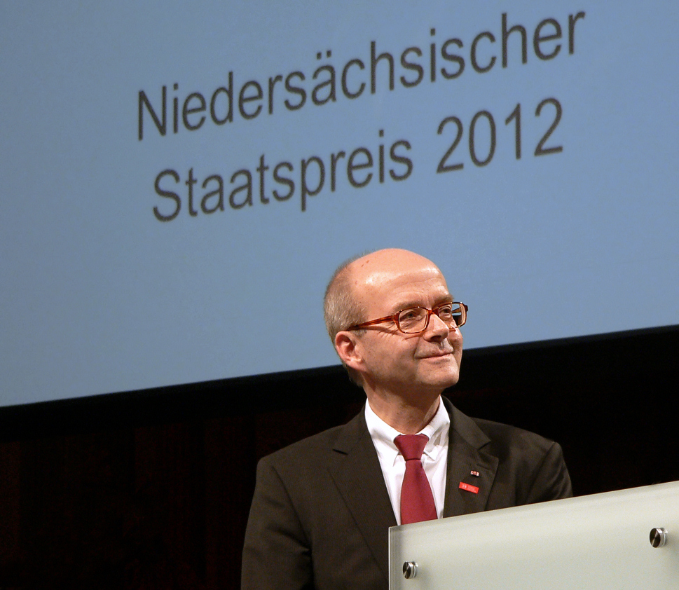 Ulrich Reimers bei der Verleihung Niedersächsischer Staatspreis